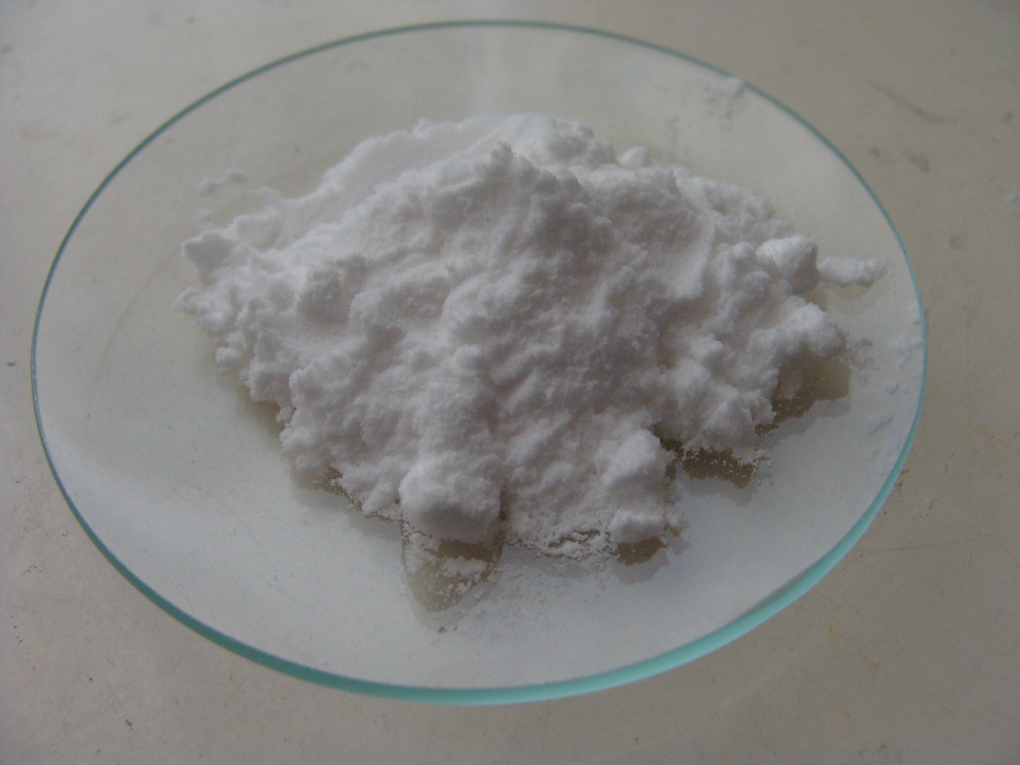 碳酸氢钠